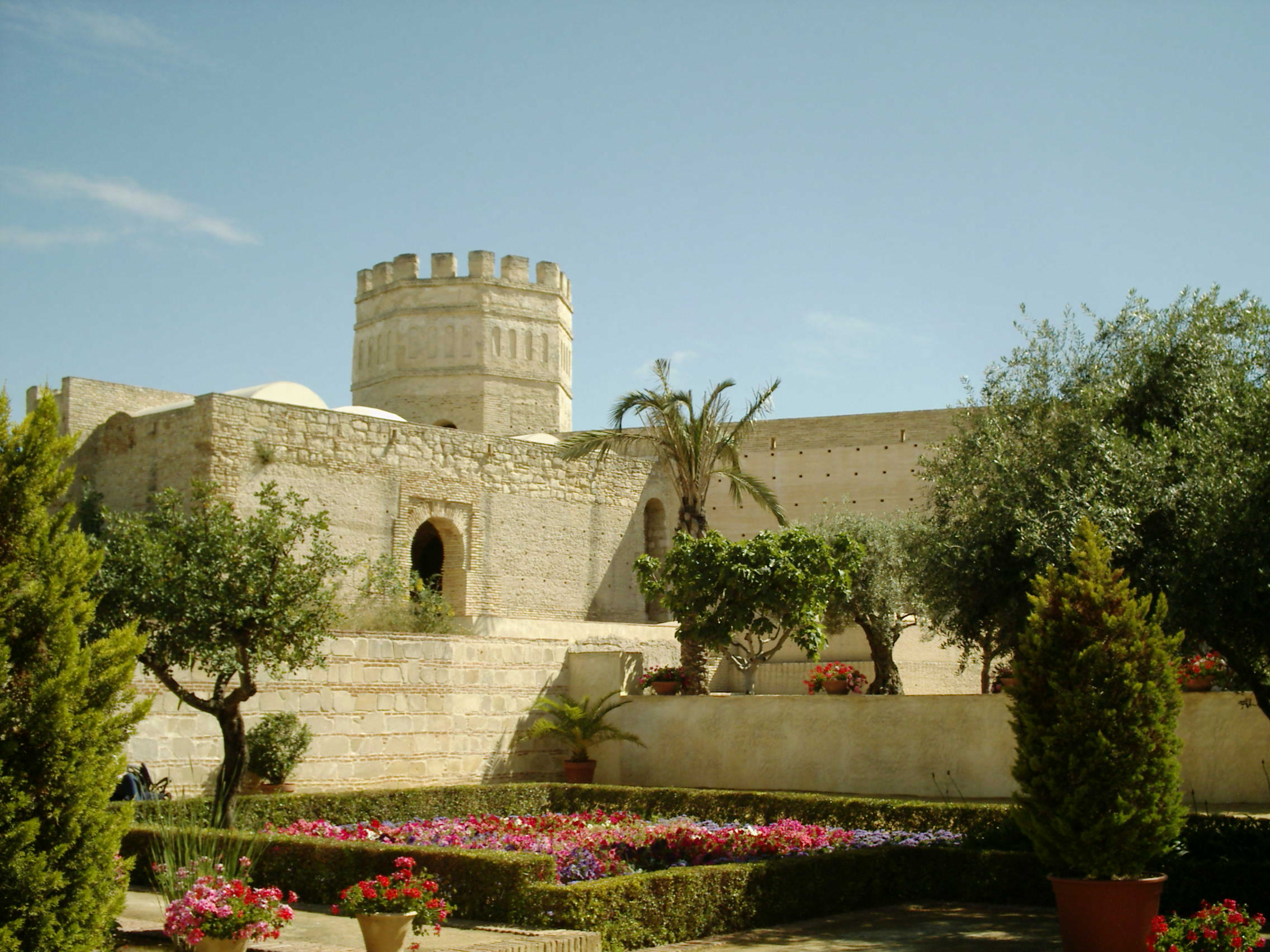 Vista interior del alcázar de Jerez de la Frontera (Cádiz - España)